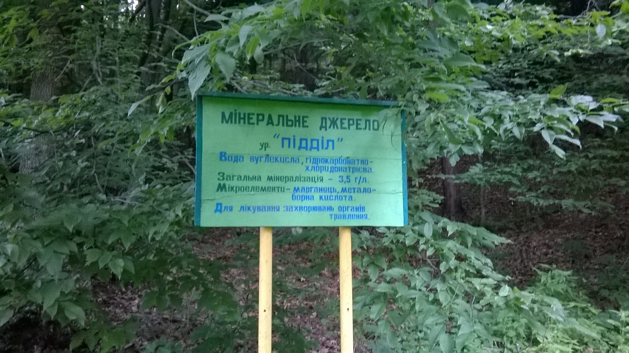 Джерело Б/н, Рахівський р-н, ДП «Рахівське ЛДГ», урочище «Підділ», Рахівське л-во, квартал 6, виділ 31